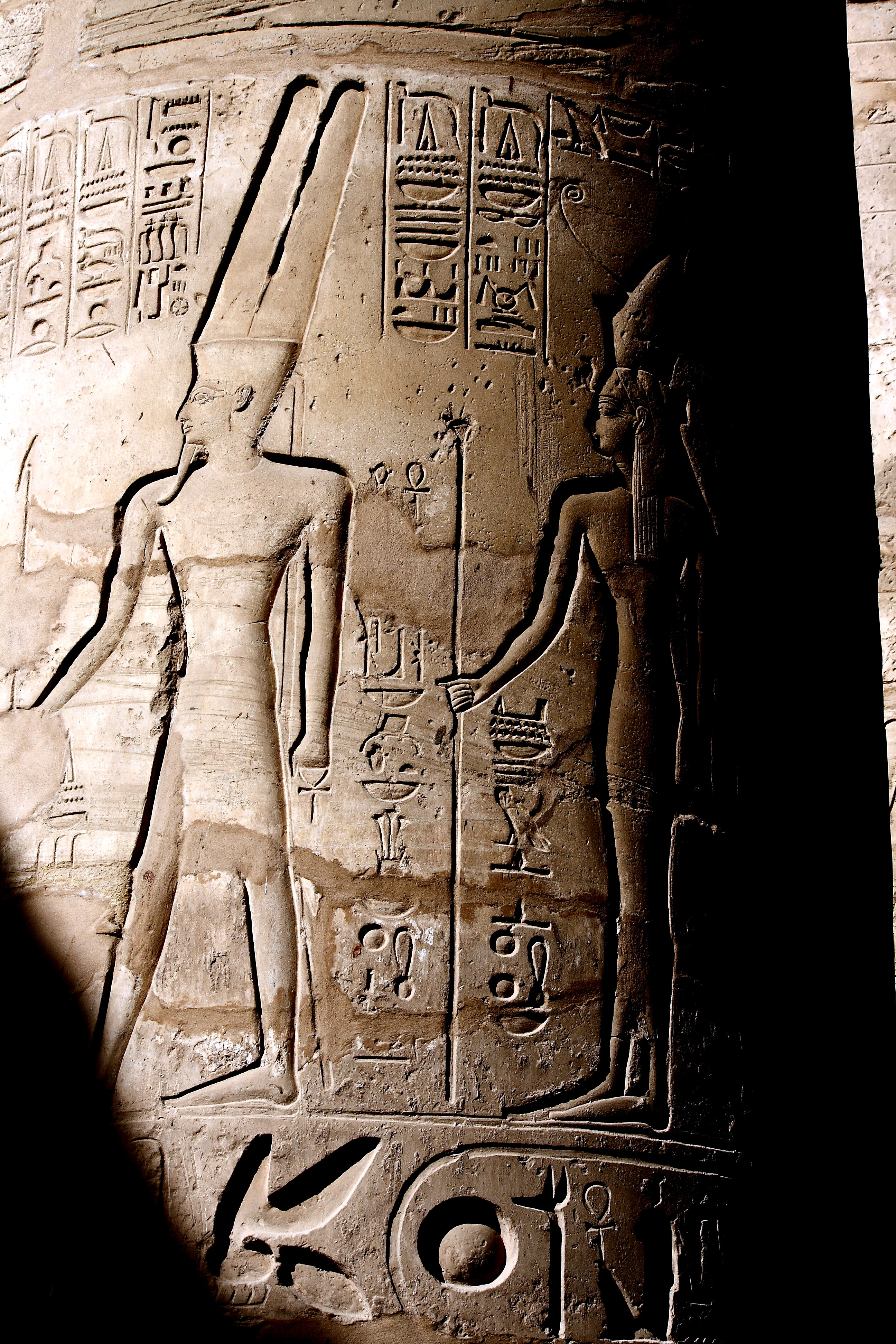 Karnak_temple, Großer_Säulensaal, Relief